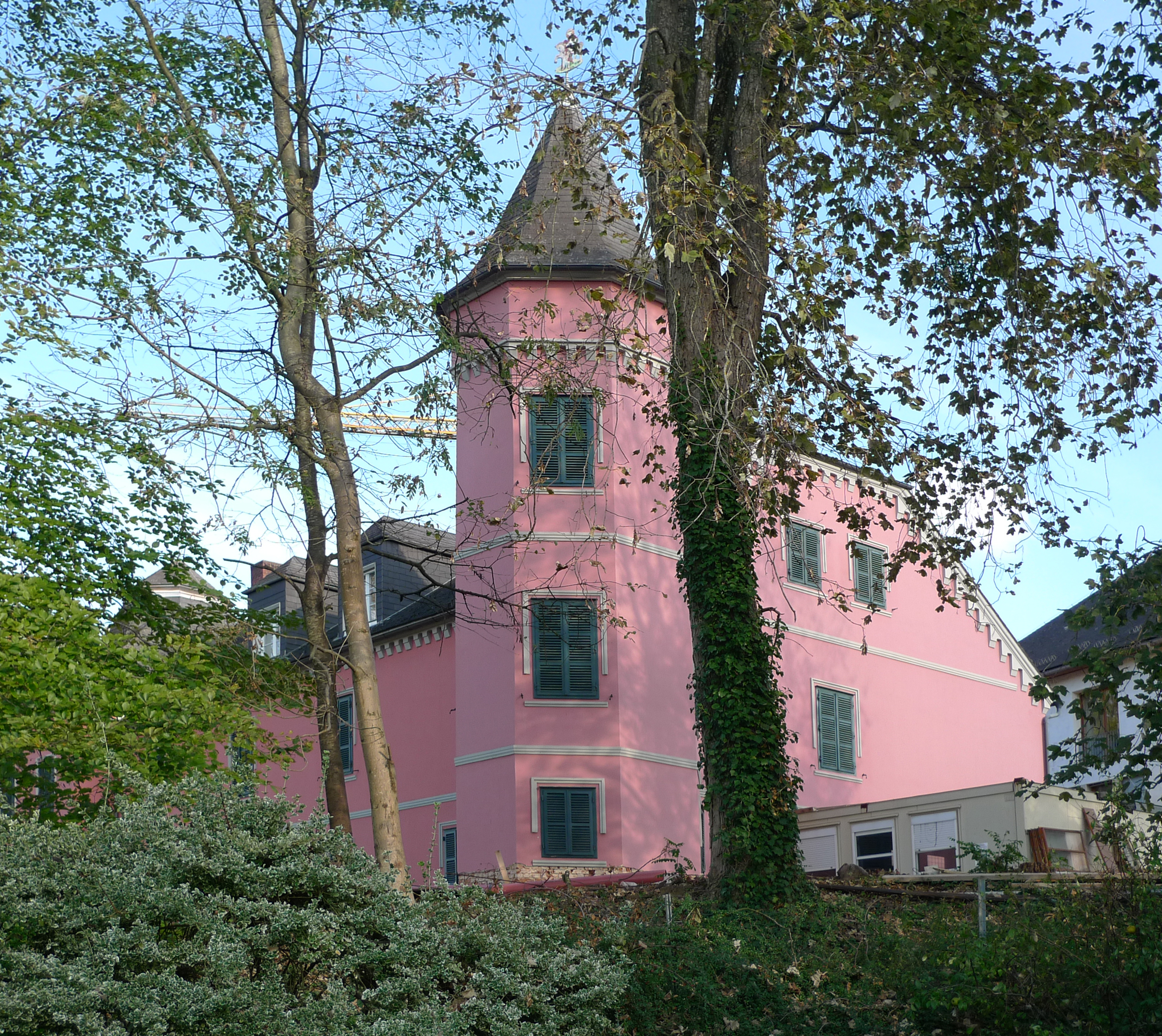 Schloss Stein, heute Landwirtschaftliche Hauswirtschaftsschule, Fehring